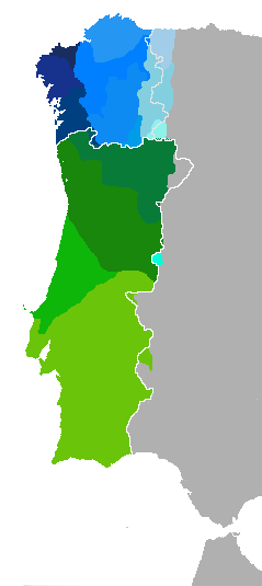 Idiomas y dialectos ibéricos de las lenguas del grupo galaico-portugués. Dialectos del idioma gallego Dialectos del idioma portugués